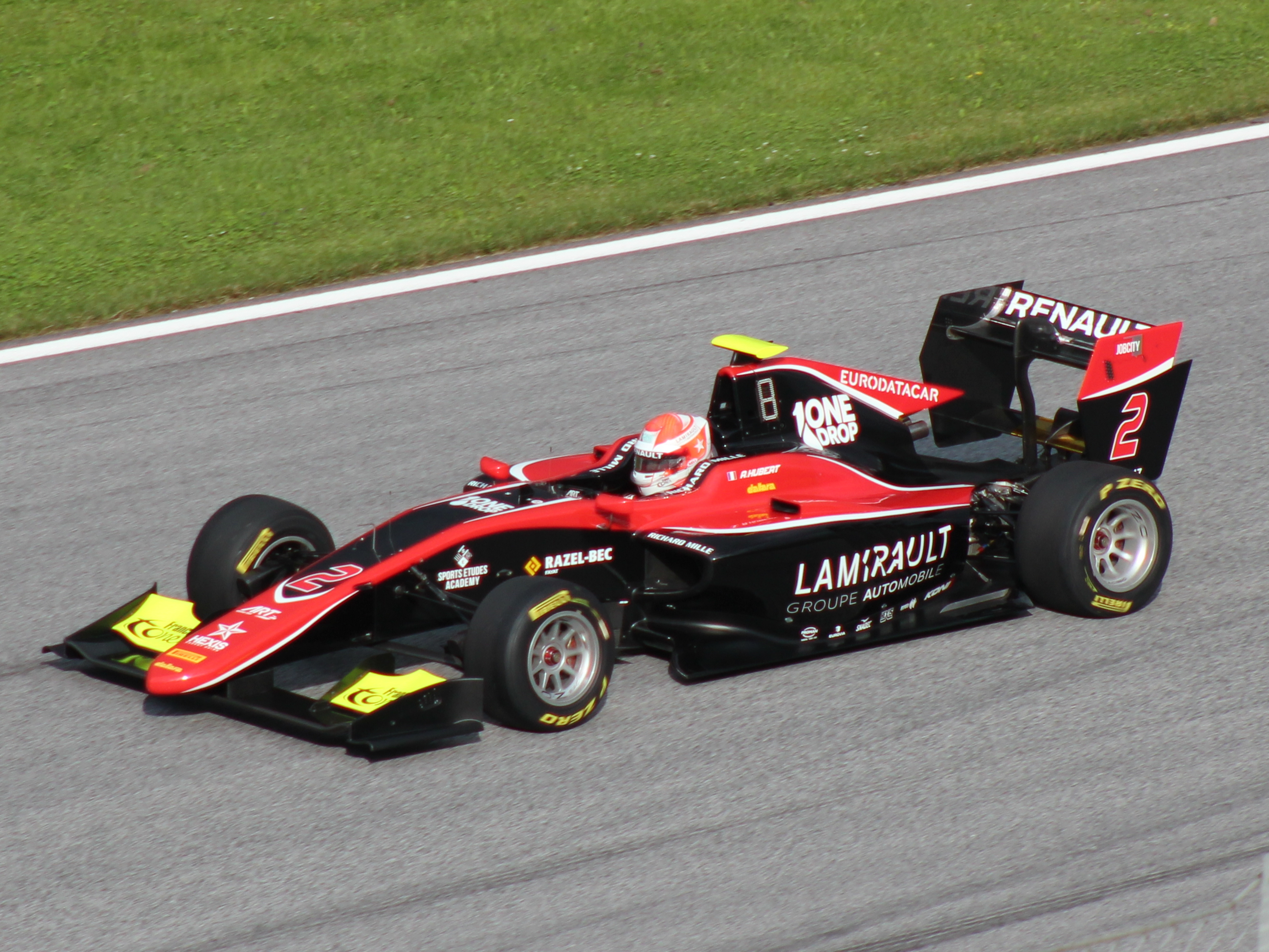 02 Anthoine Hubert beim Rennwochenende in Österreich 2018 (1)